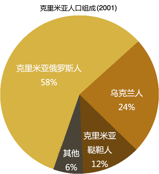 2001年克里米亚俄罗斯人（58%）、乌克兰人（24%）、克里米亚鞑靼人（12%）所占百分比